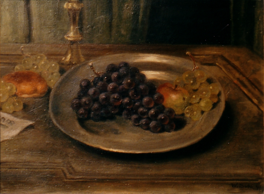 Stilleben mit Trauben des Künstlers Walter Schliephacke, Öl auf Leinwand.